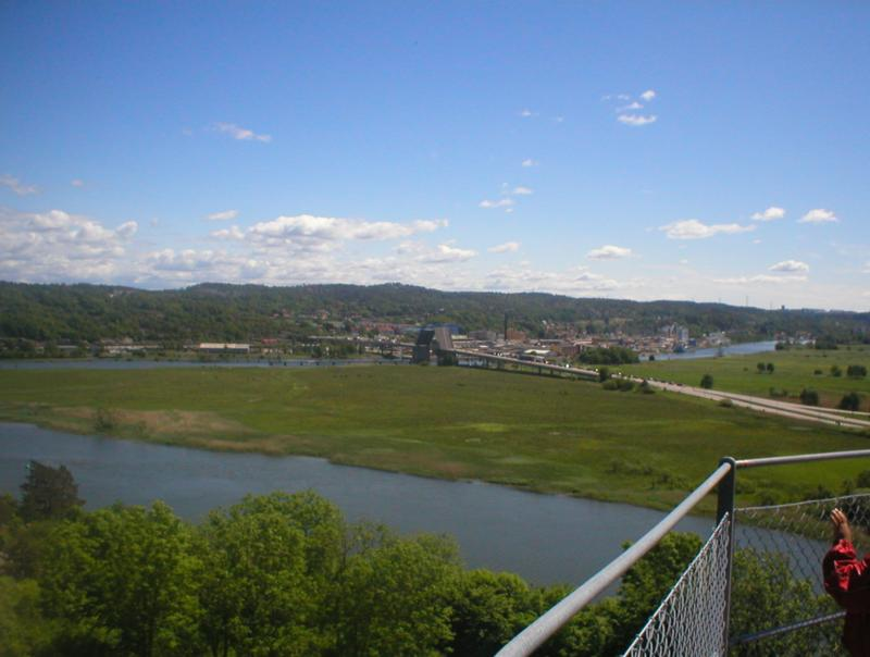 Foto av Jordfallsbron i öppet läge, från Bohus fästning.